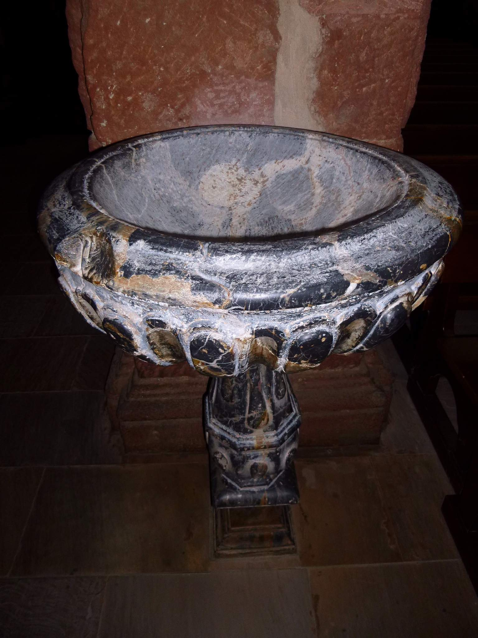 Iglesia de Santa María la Mayor (Alcázar de San Juan, Ciudad Real)